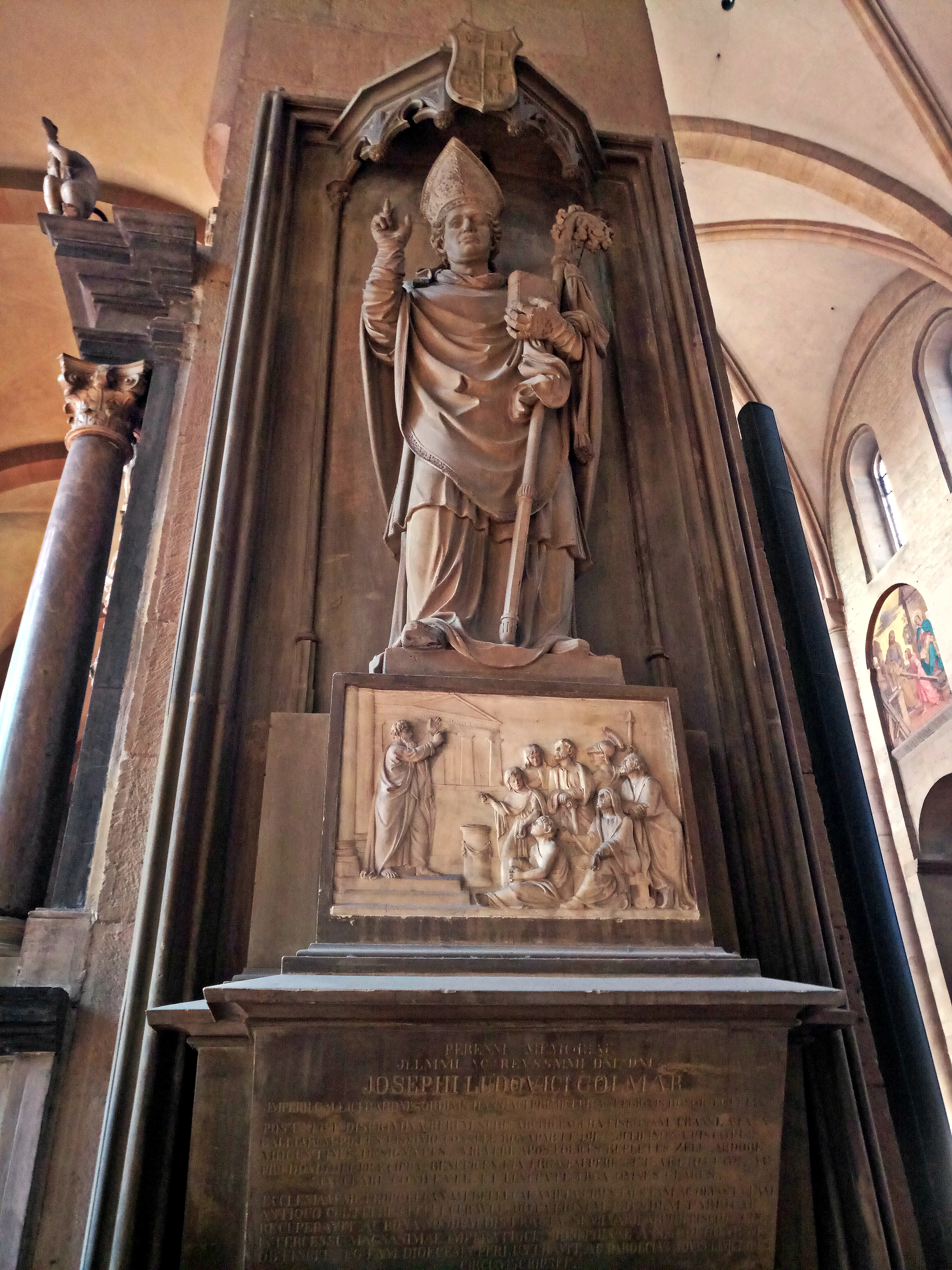 Mainzer Dom, Grabdenkmal Bischof Joseph Ludwig Colmar (+ 1818)